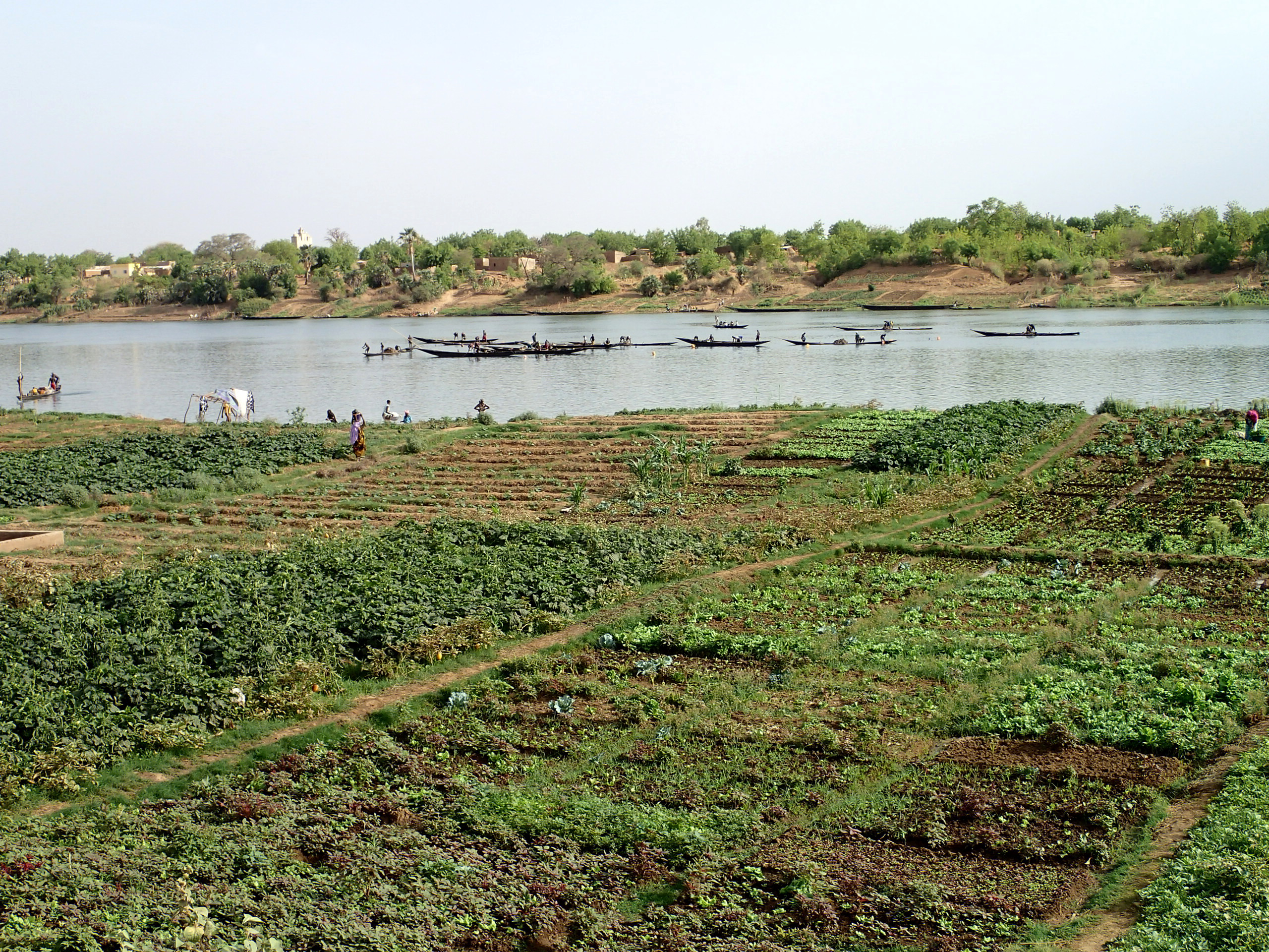 De nombreux jardins maraîchers sont cultivés au bord du fleuve Sénégal, à Kayes, au Mali. This is an image of food from Mali